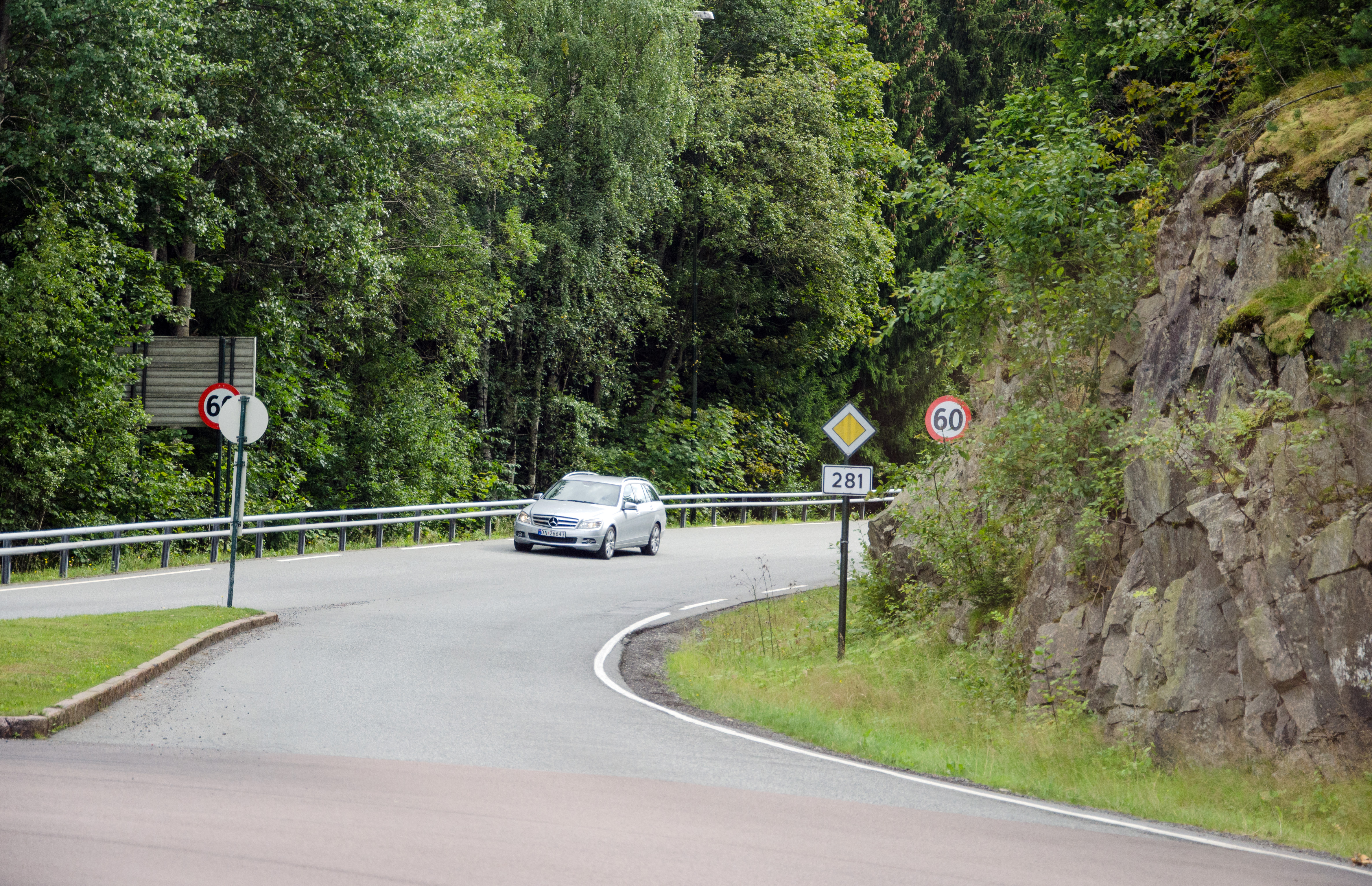 Fylkesvei 281 Storsandveien